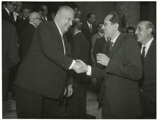 Cerimonia per il 25° Anniversario dell'Assemblea Costituente , Giuseppe Bettiol saluta Emilio Colombo